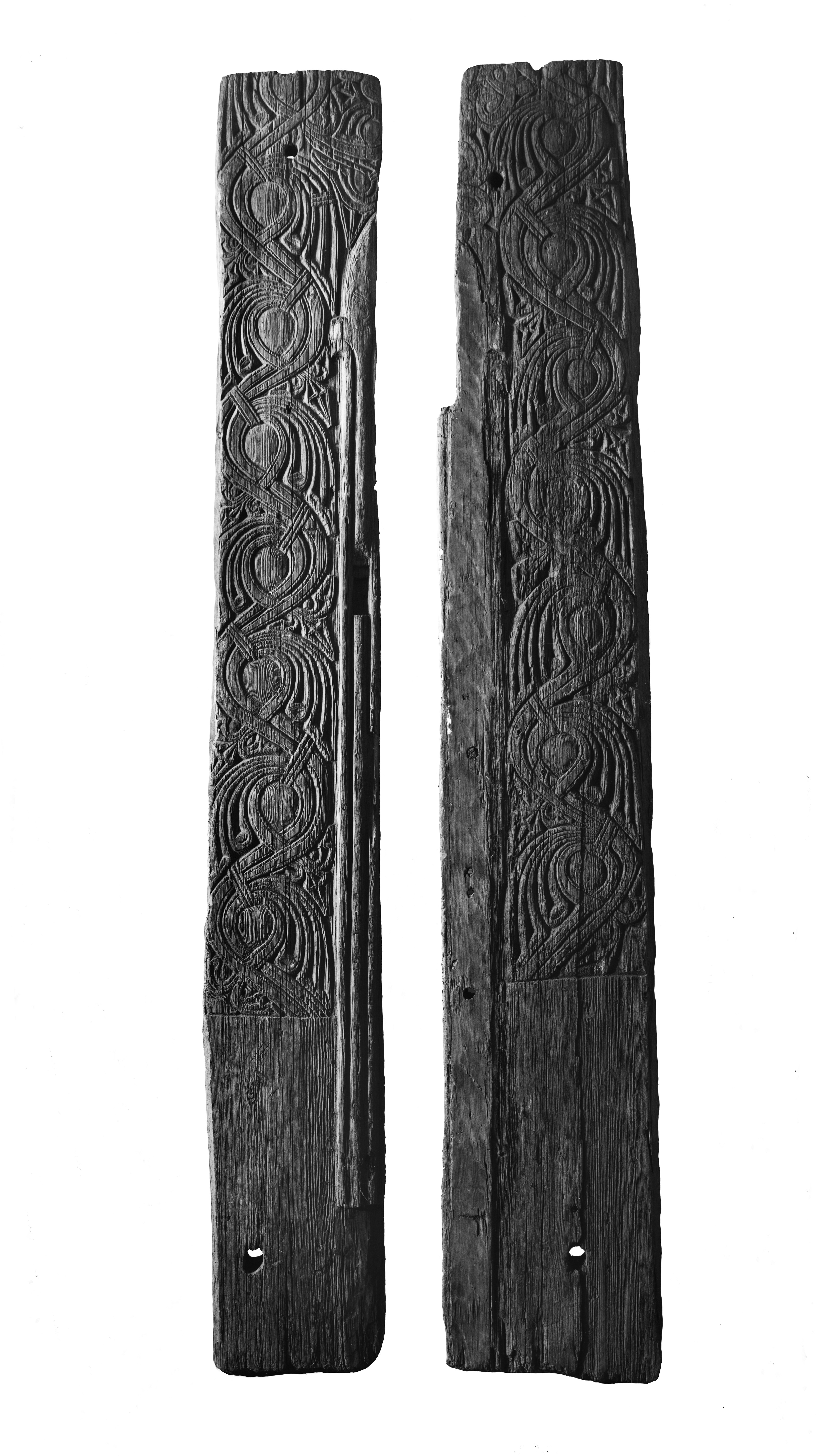 Portalplanker fra Gåra stavkirke, Bø i Telemark. Fra Kulturhistorisk museums fotosamling på Unimus (jf. søk).